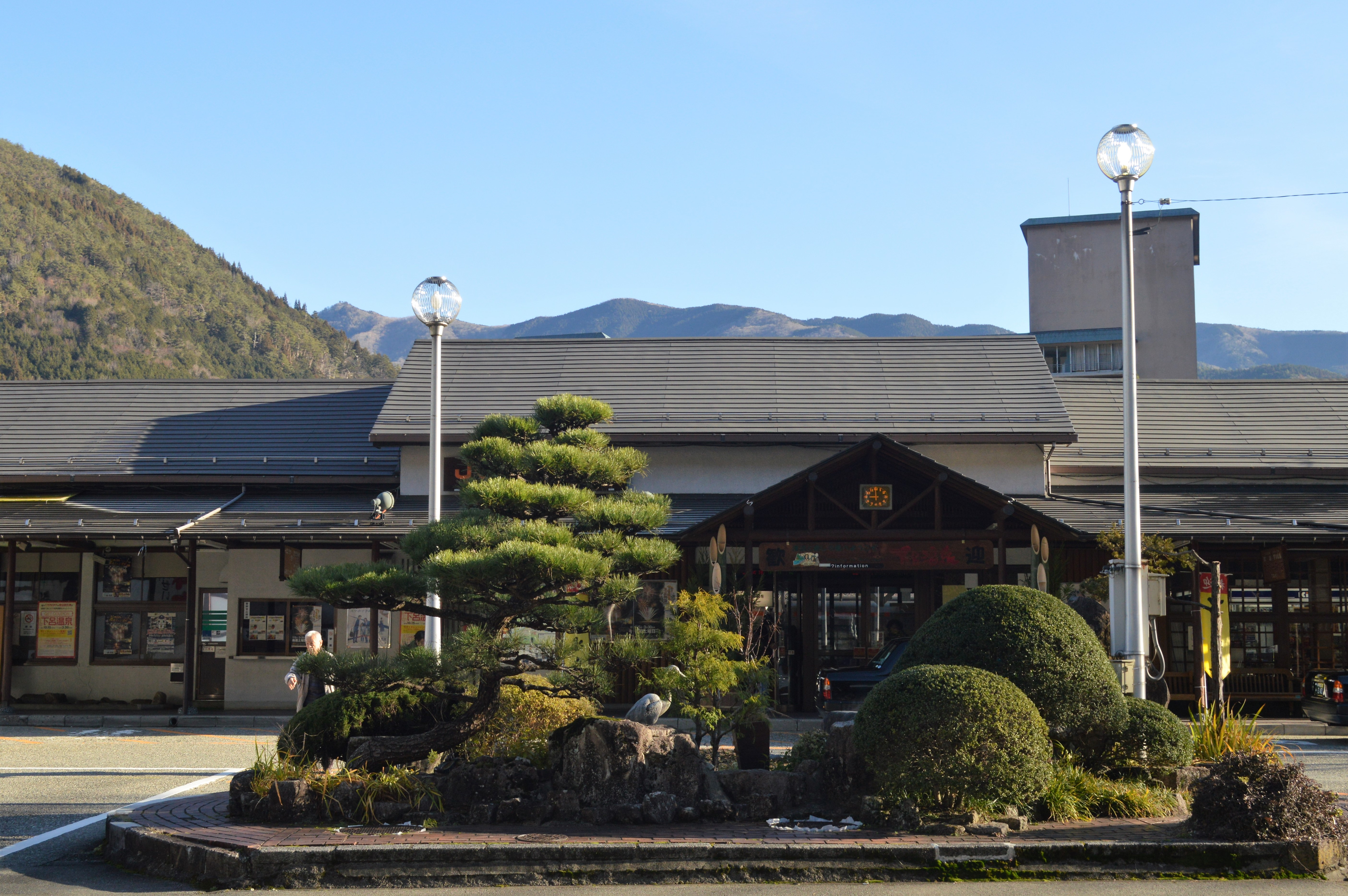 JR高山本線下呂駅。岐阜県下呂市。